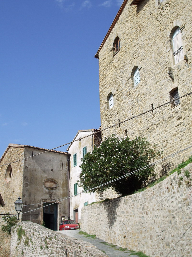 descrizione: scorcio del borgo di Montorgiali (GR) lavoro personale di Vinattieri Matteo che lascia in pubblico dominio il 04/02/2007; foto digitale scattata nell'agosto 2006.